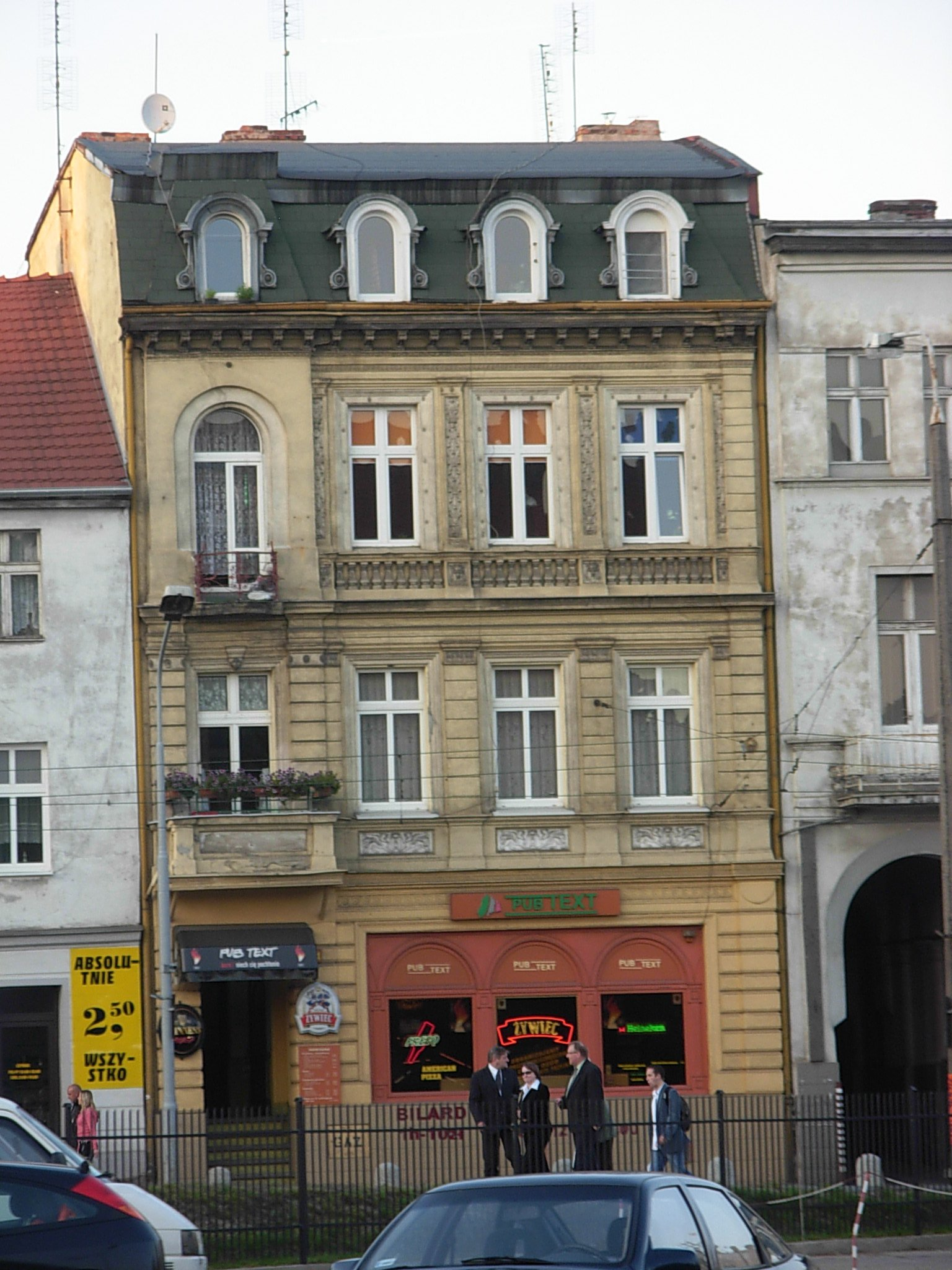 Kamienica Ul. Focha 24 w Bydgoszczy